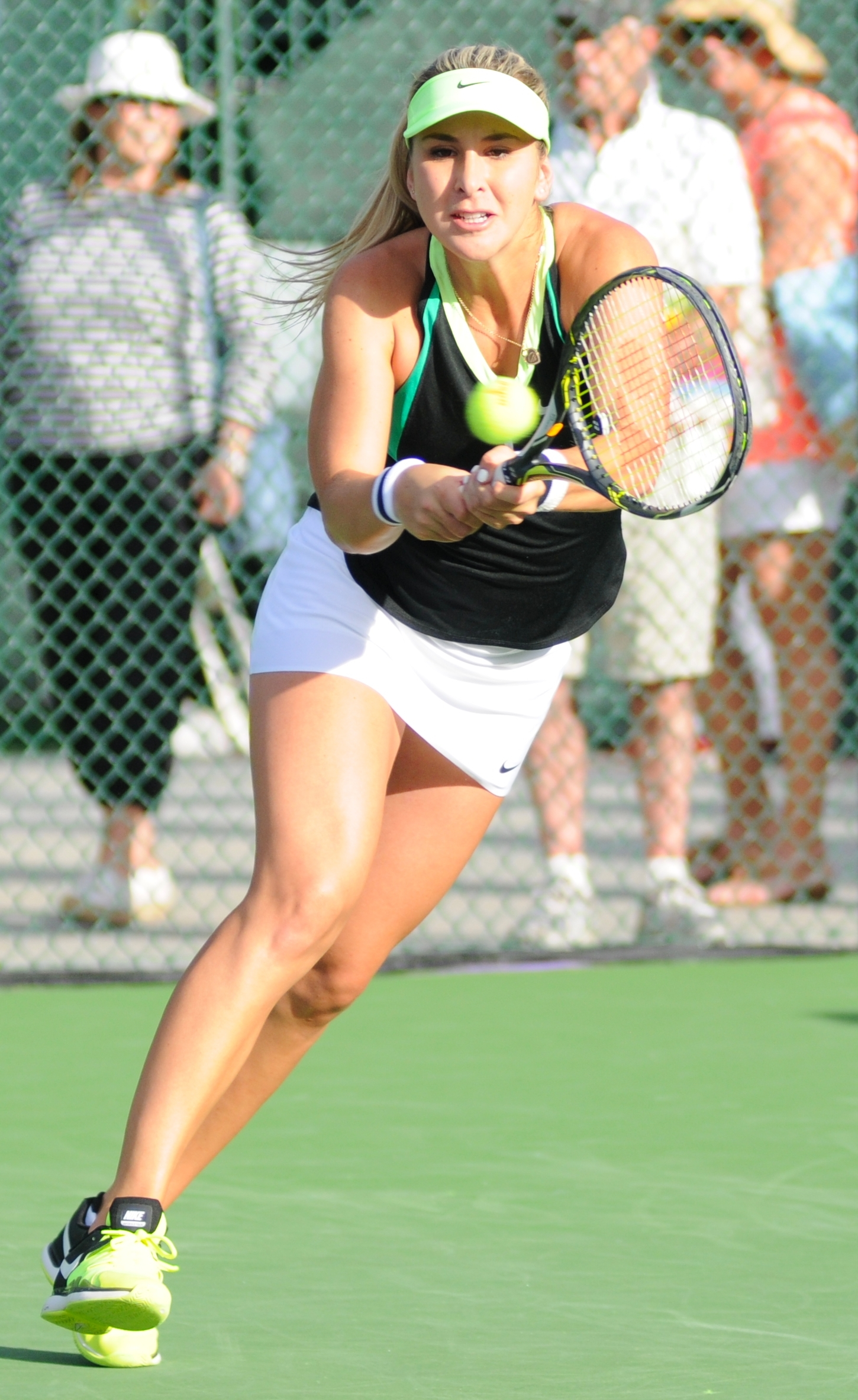 2017 BNP Paribas Open